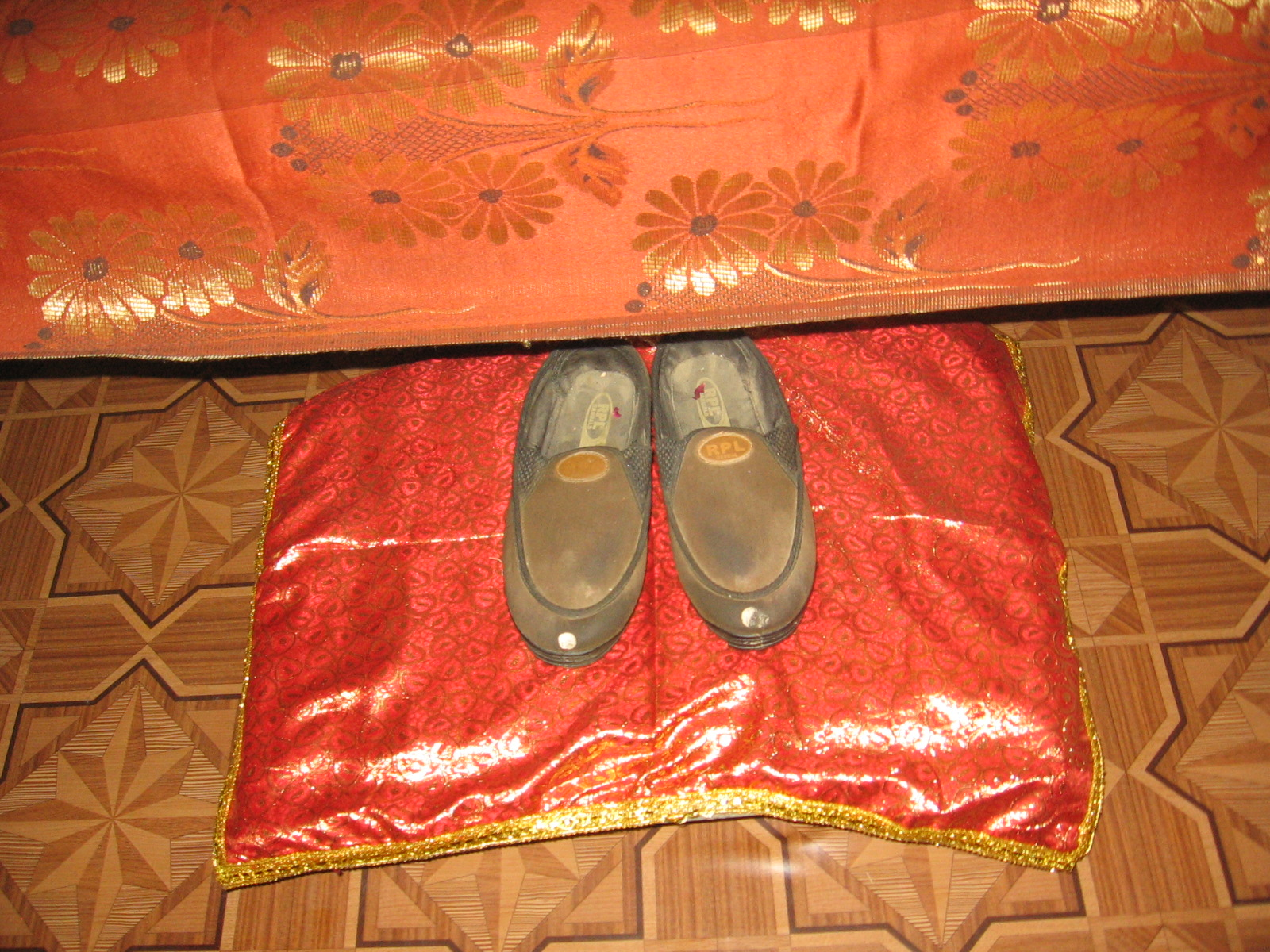 Tradition carried on by artifacts: The shoes of the guru. Photo by Milan Fujda.